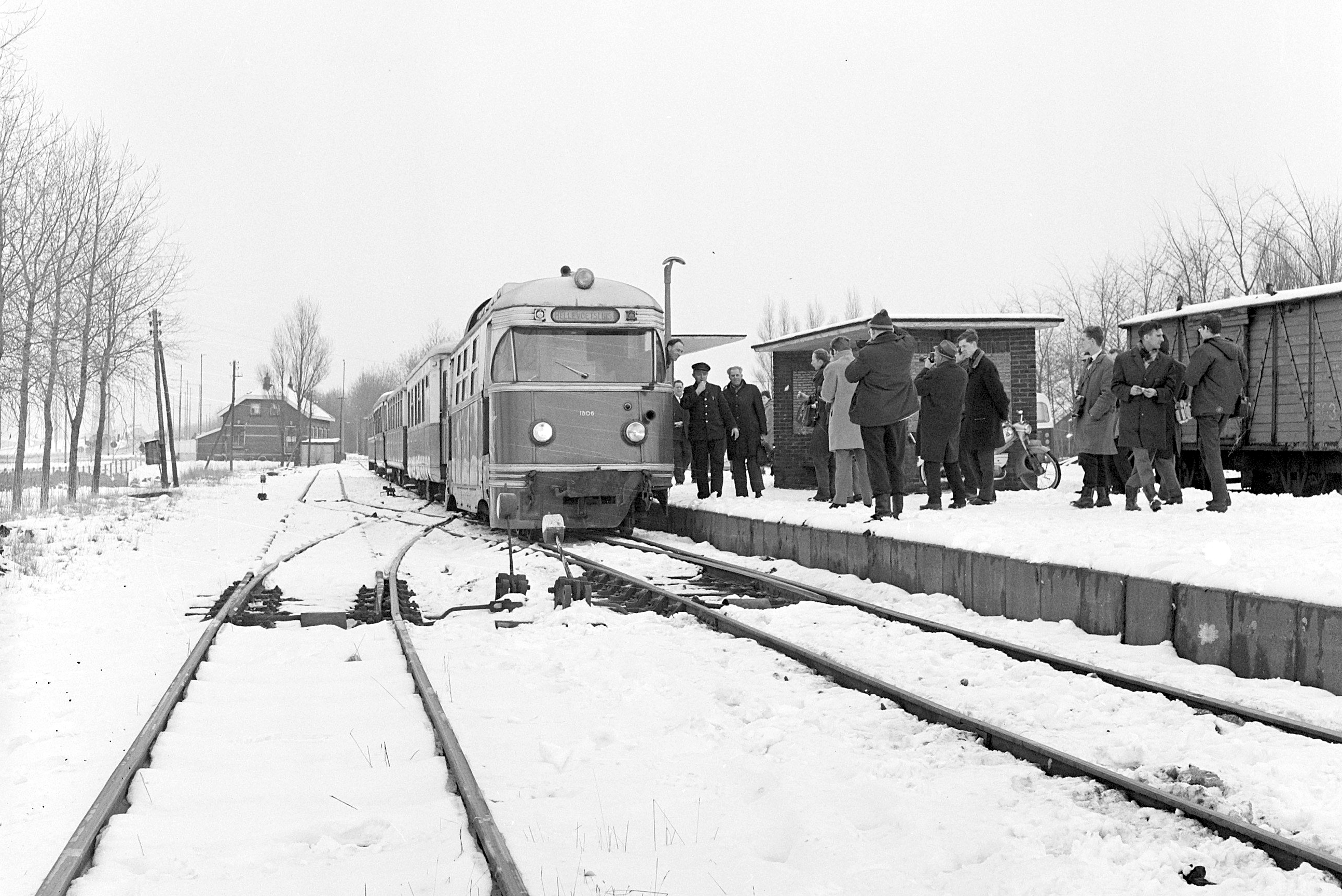 Collectie / Archief : Fotocollectie Anefo Reportage / Serie : [ onbekend ] Beschrijving : De lijn Spijkenisse-Hellevoetsluis van RTM opgeheven, de mensen waren uitgelopen om laatste treintje te zien vertrekken Datum : 14 februari 1966 Trefwoorden : treinen, vertrekken Instellingsnaam : RTM Fotograaf : Voets, Jan / Anefo Auteursrechthebbende : Nationaal Archief Materiaalsoort : Negatief (zwart/wit) Nummer archiefinventaris : bekijk toegang 2.24.01.03 Bestanddeelnummer : 918-7802